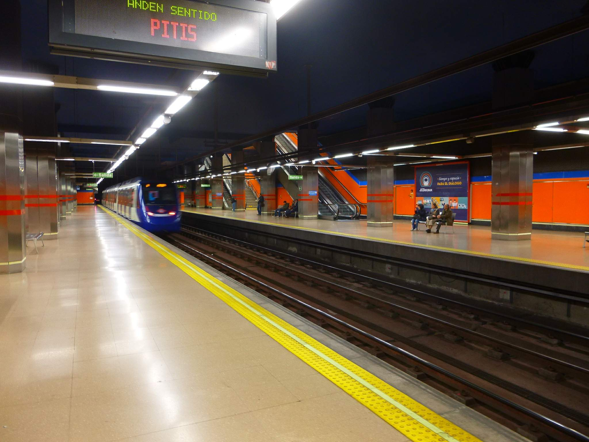 Madrid - Estación de Islas Filipinas